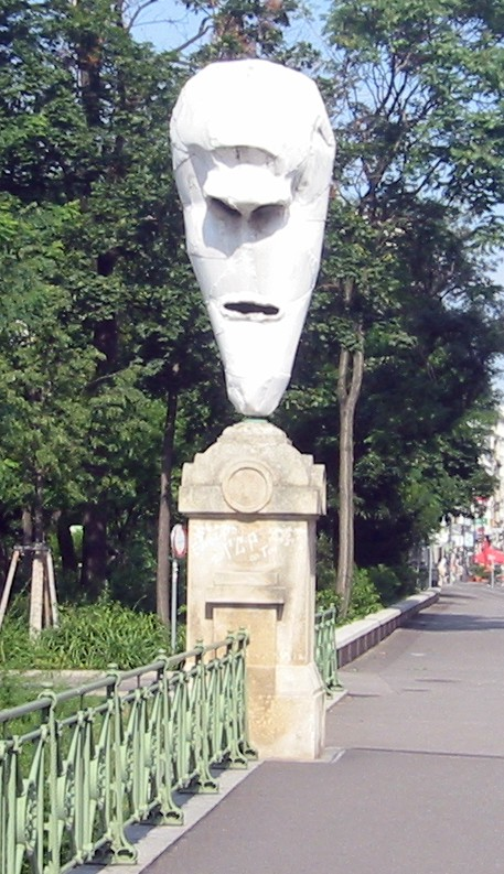 Wien, Stubenbrücke über den Wienfluss, Skulptur von Franz West